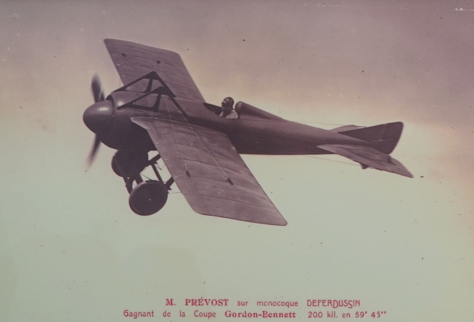 présenté au Musée de l'aéronautique Bétheny.